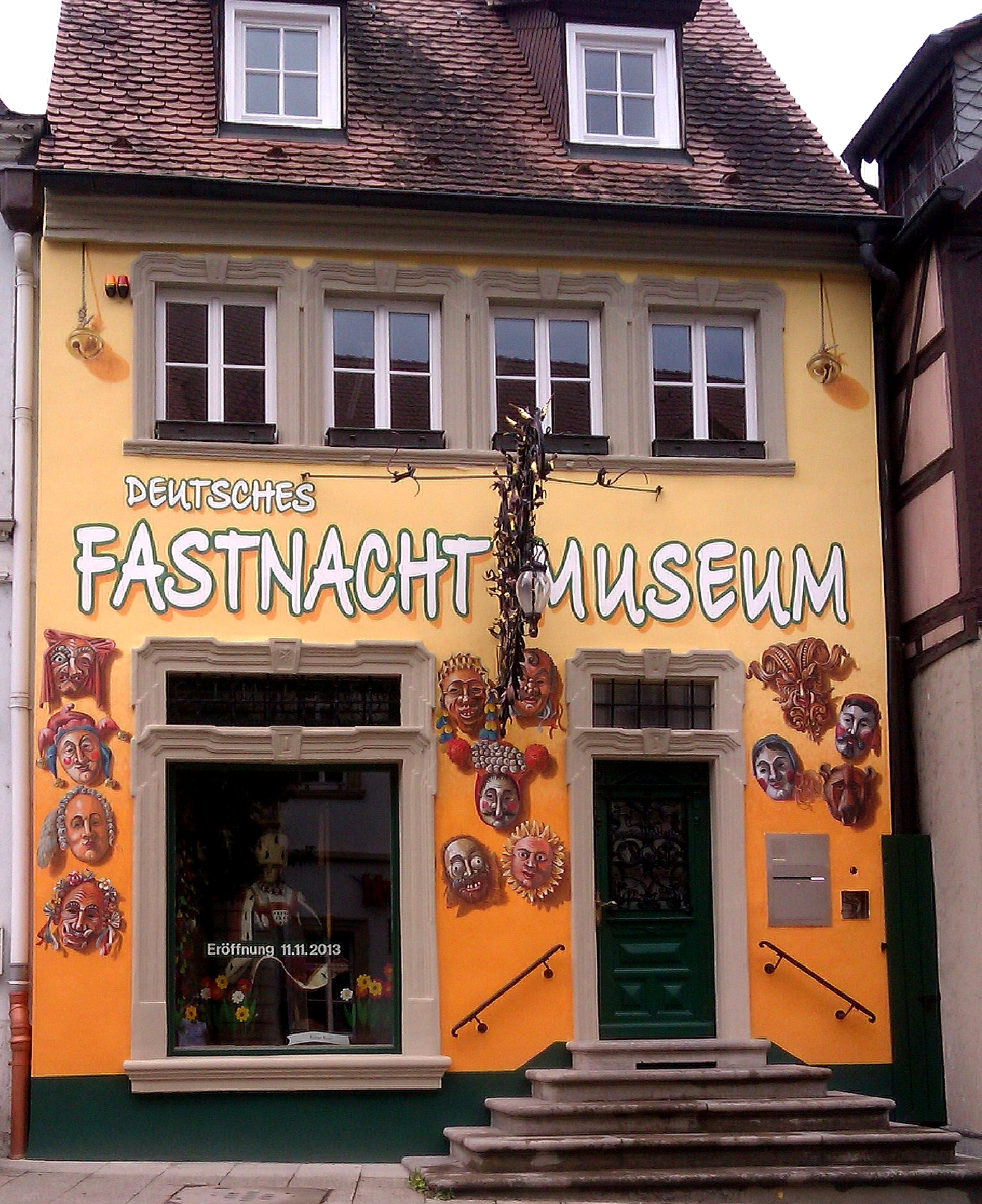 Das neue Gebäude des Deutschen Fastnachtsmuseums in Kitzingen